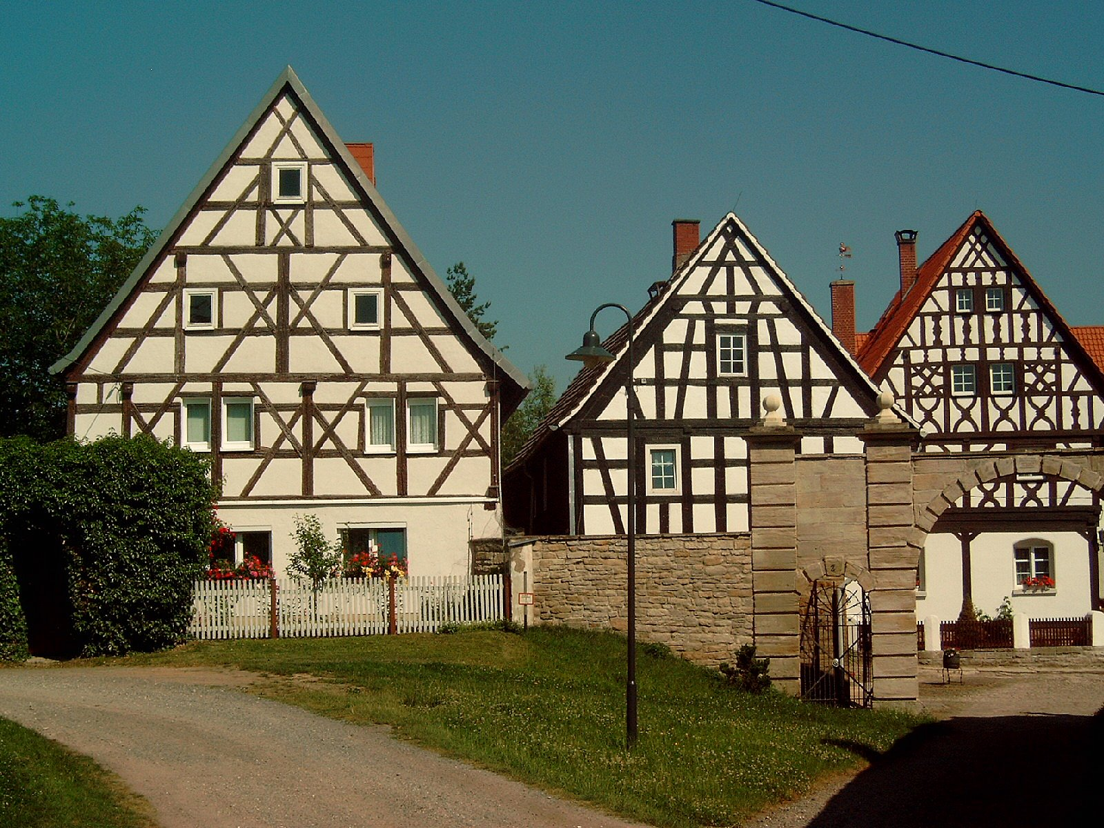 Fachwerkhäusergruppe in Kadischen, Gemeinde Elsteraue Urheber: selbst erstellt